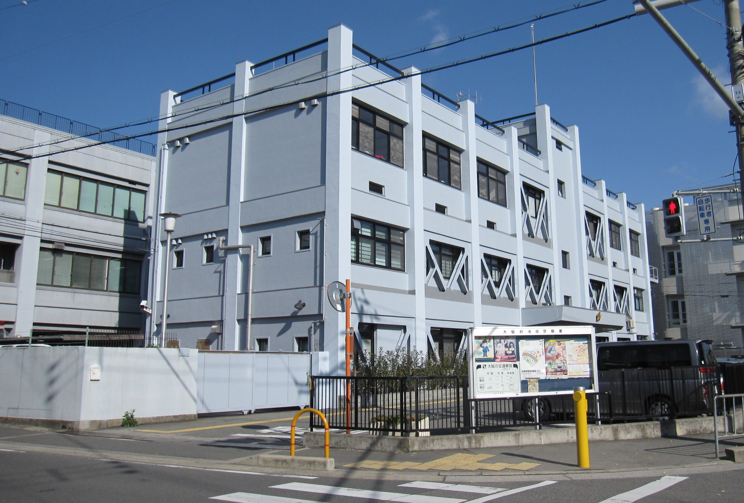 池田警察署（大阪府）